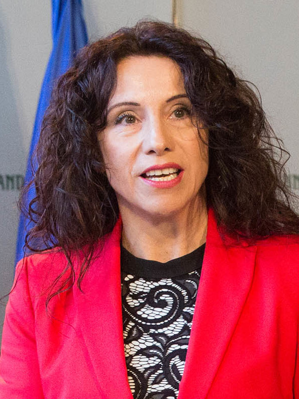 La libérale Rocío Ruiz.